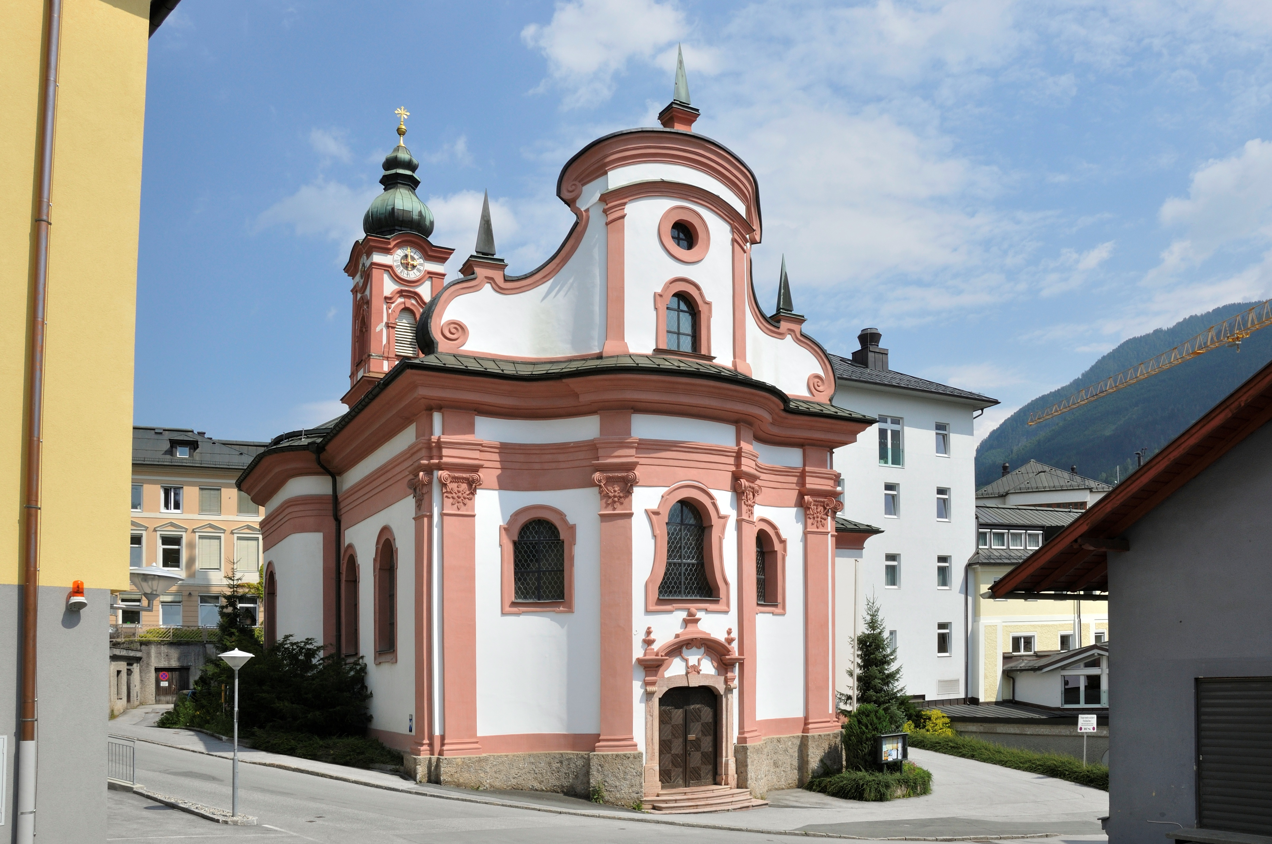 Kath. Pfarrkirche, Vikariatskirche, Spitalskaplaneikirche zur unbefleckten Empfängnis Mariae